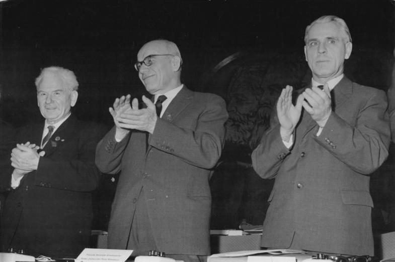 Zentralbild Kollektiv Sta-Qu 15.1.1963 VI. Parteitag der SED vom 15.-21.1.1963 in der Werner-Seelenbinder-Halle in Berlin (1.Tag). UBz. Blick auf das Präsidium. V.l.n.r.: das Mitglied des Politbüros des ZK der SED, Hermann Matern, der Erste Sekretär des ZK der Polnischen Vereinigten Arbeiterpartei Wladyslaw Gomulka und das Mitglied des Politbüros des ZK der SED, Willi Stoph. (Heilig)